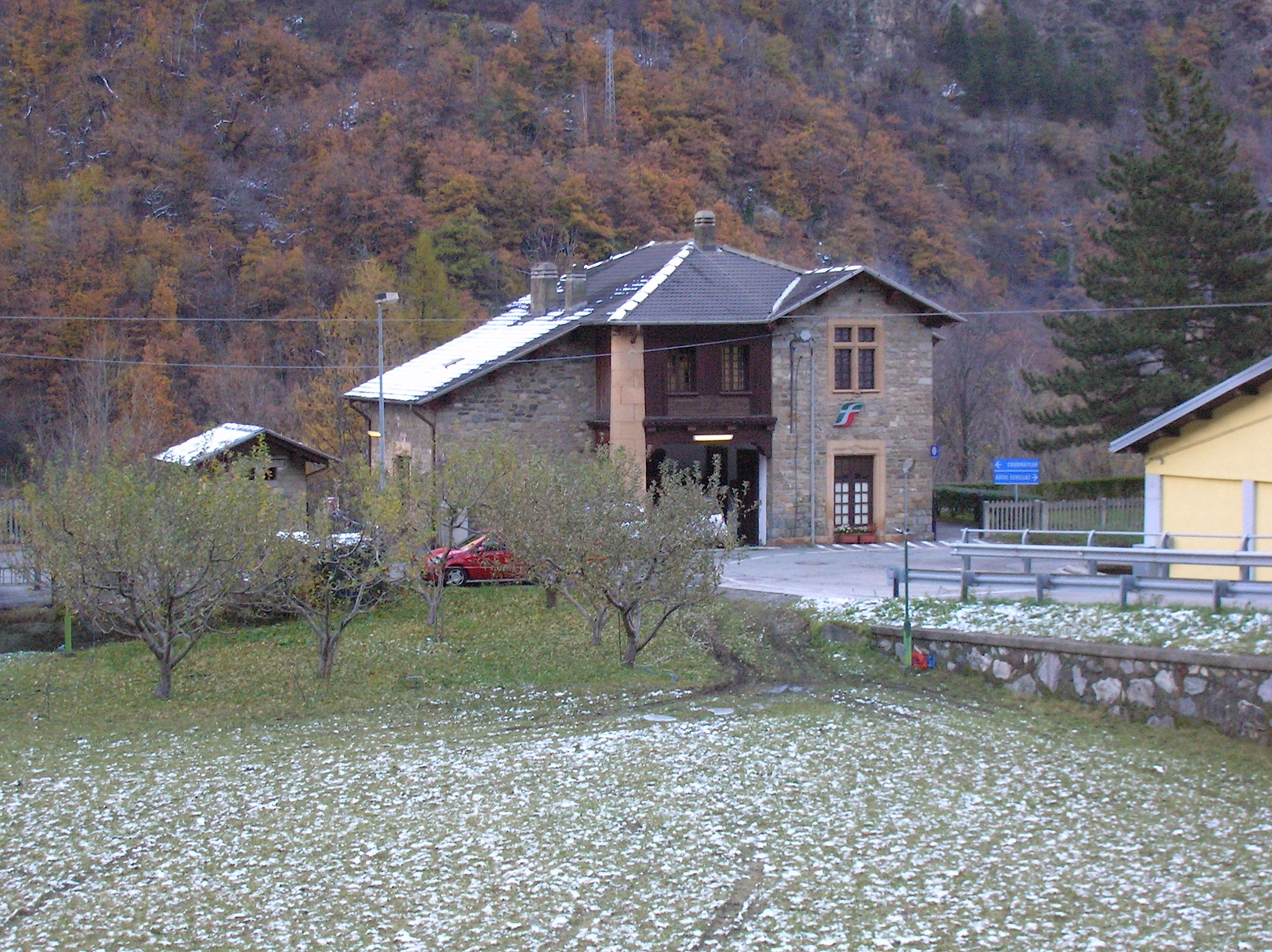 stazione di Avise, Valle d'Aosta, Italia.